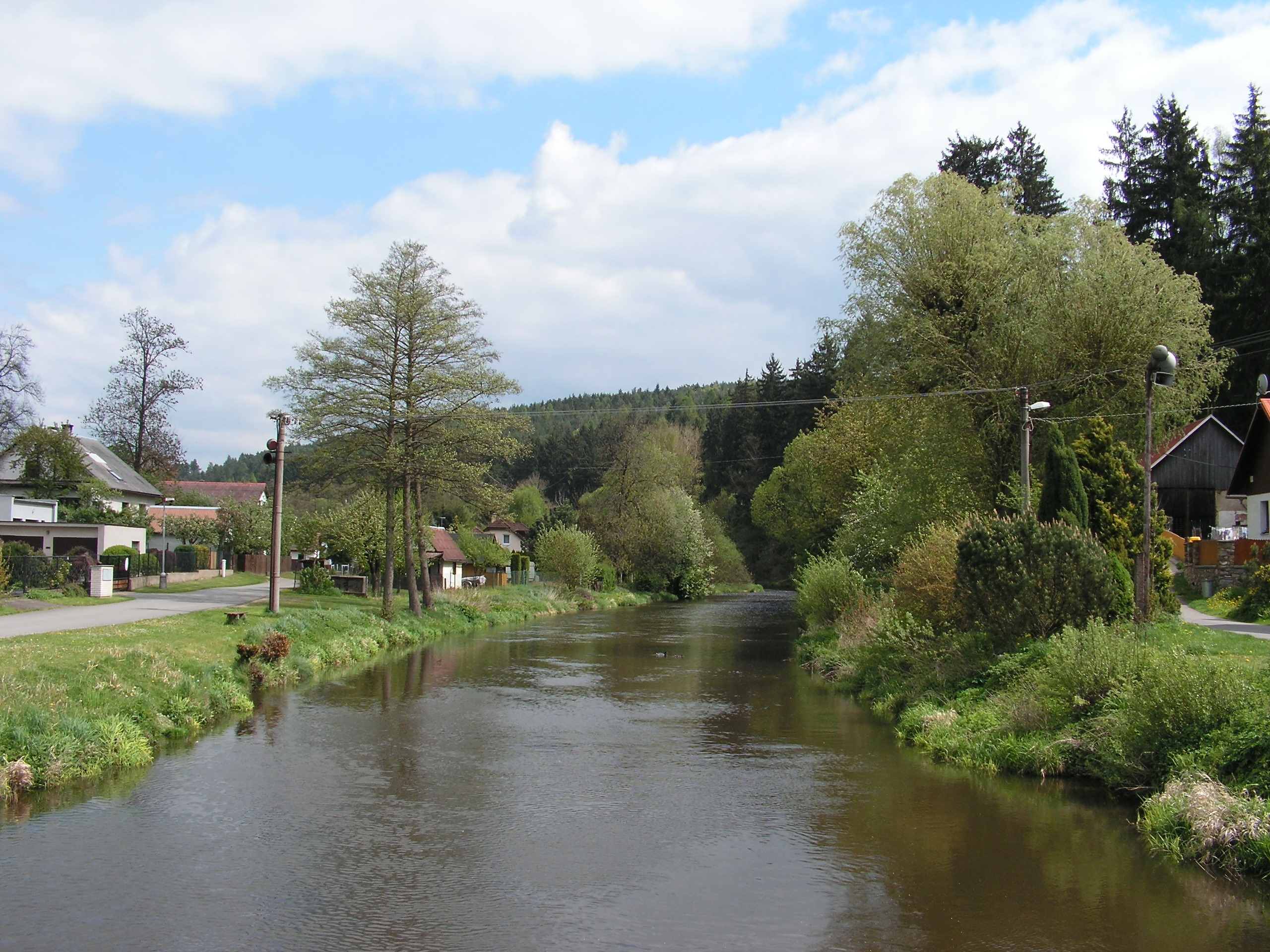 Želivka v Želivě v okrese Pelhřimov